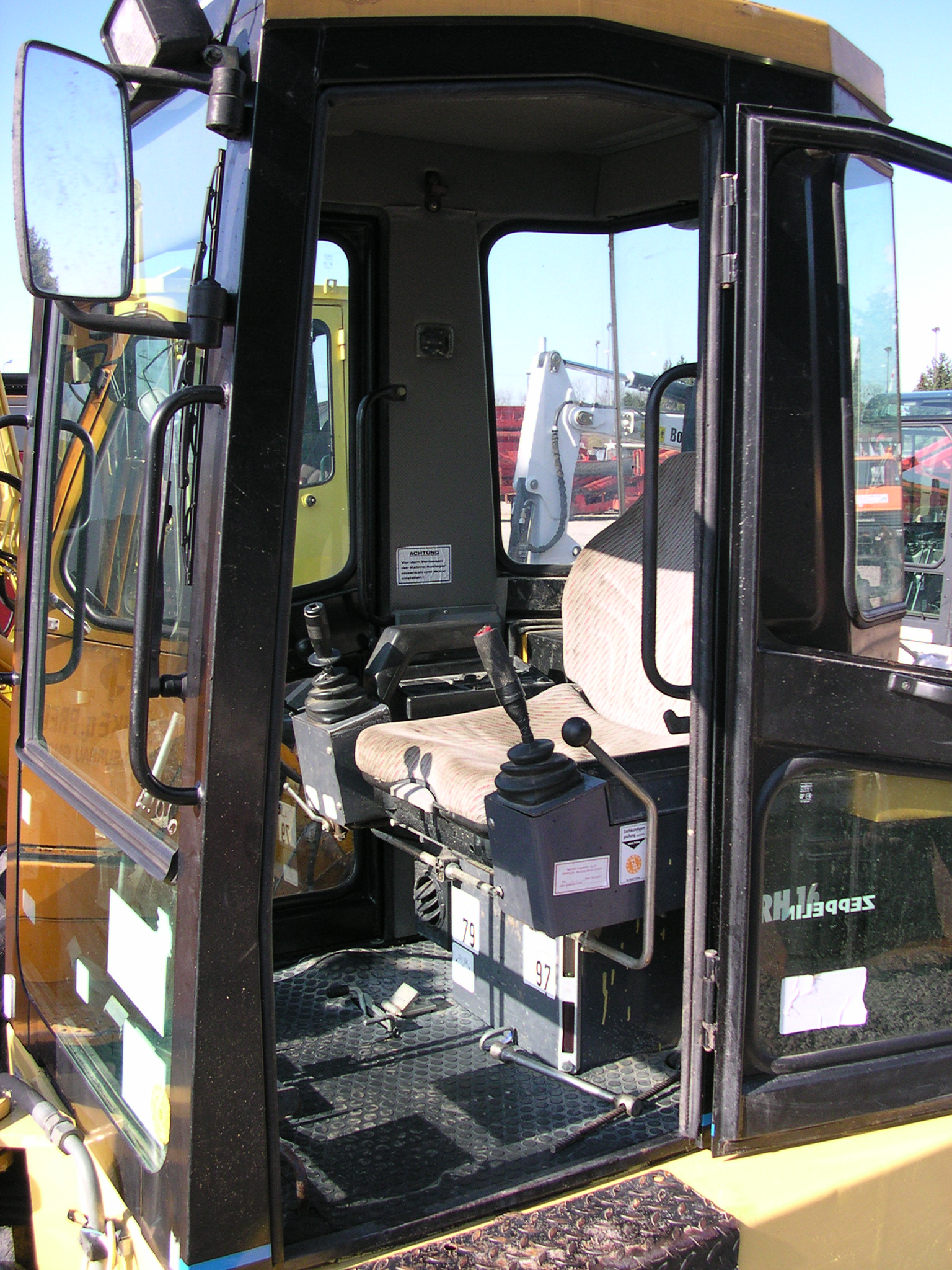 Schaeff ZRH 16 (für Zeppelin), Minibagger, 3,3 t Gesamtgewicht, Baujahr 1998